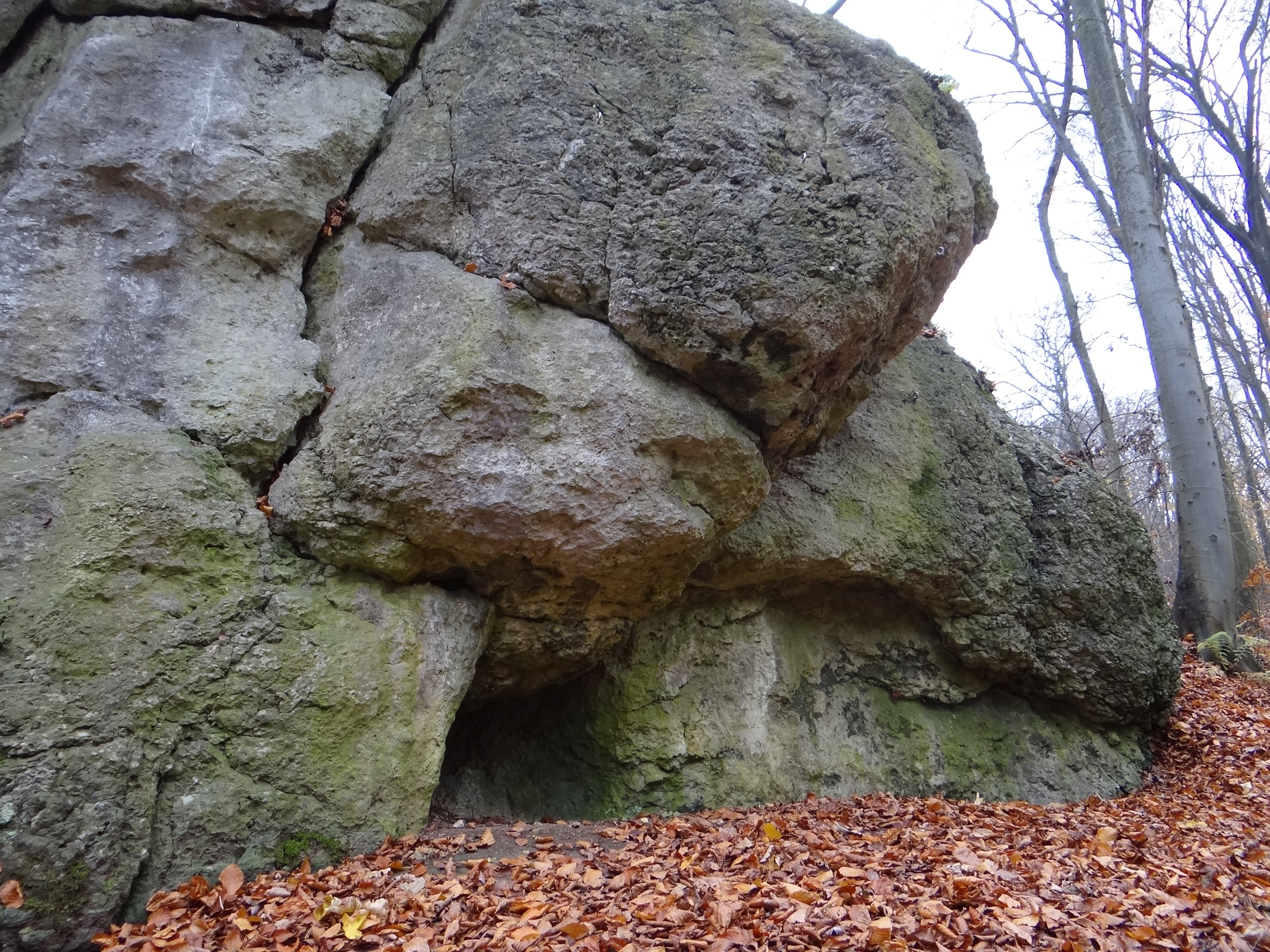 Jaskinia w Zielonym Dole